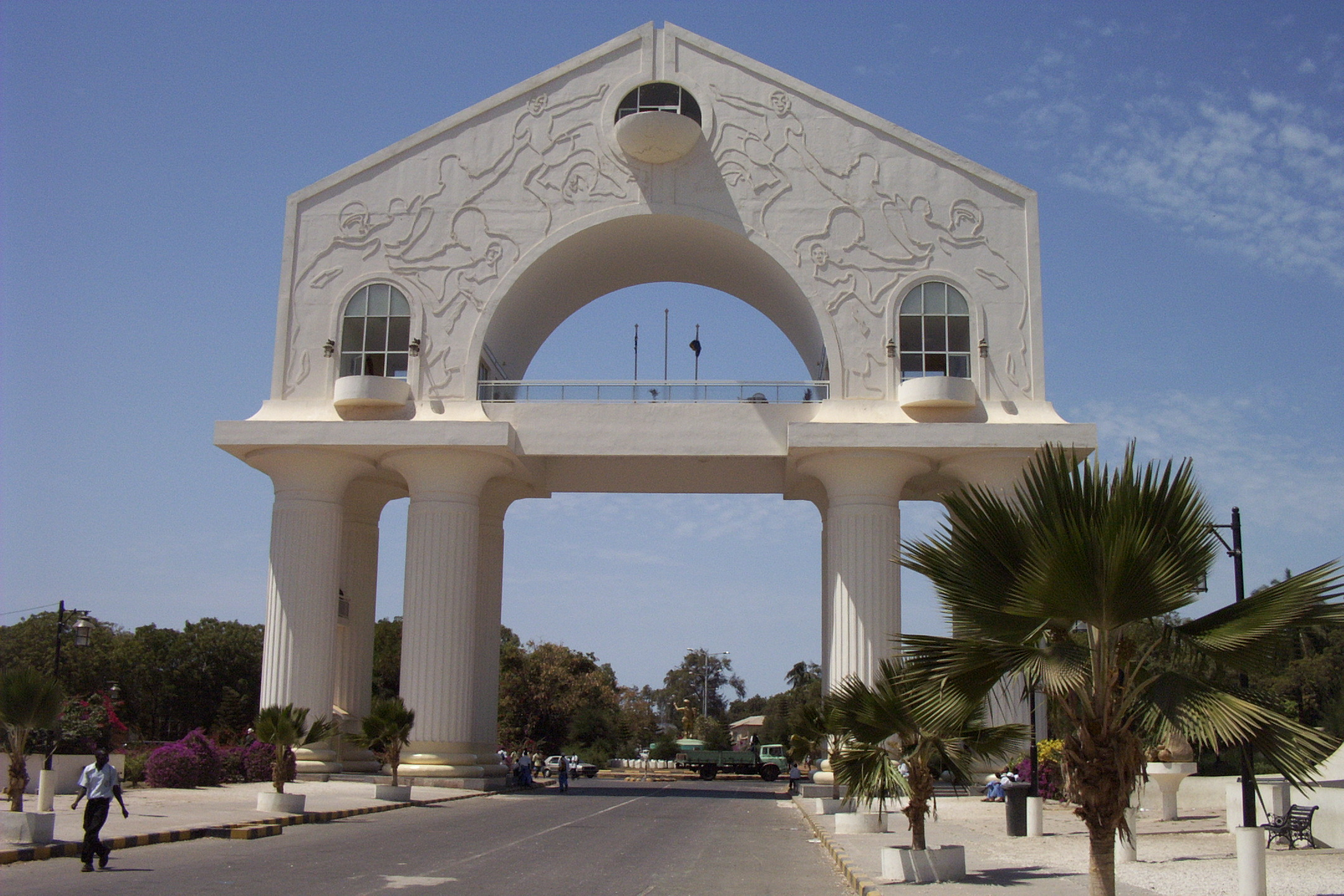 Arch 22, Triumphbogen in Banjul, Gambia zwischen dem Independance Drive und dem Banjul-Serekunda-Highway gelegen wurde am 22. Juli 1996 eingeweiht